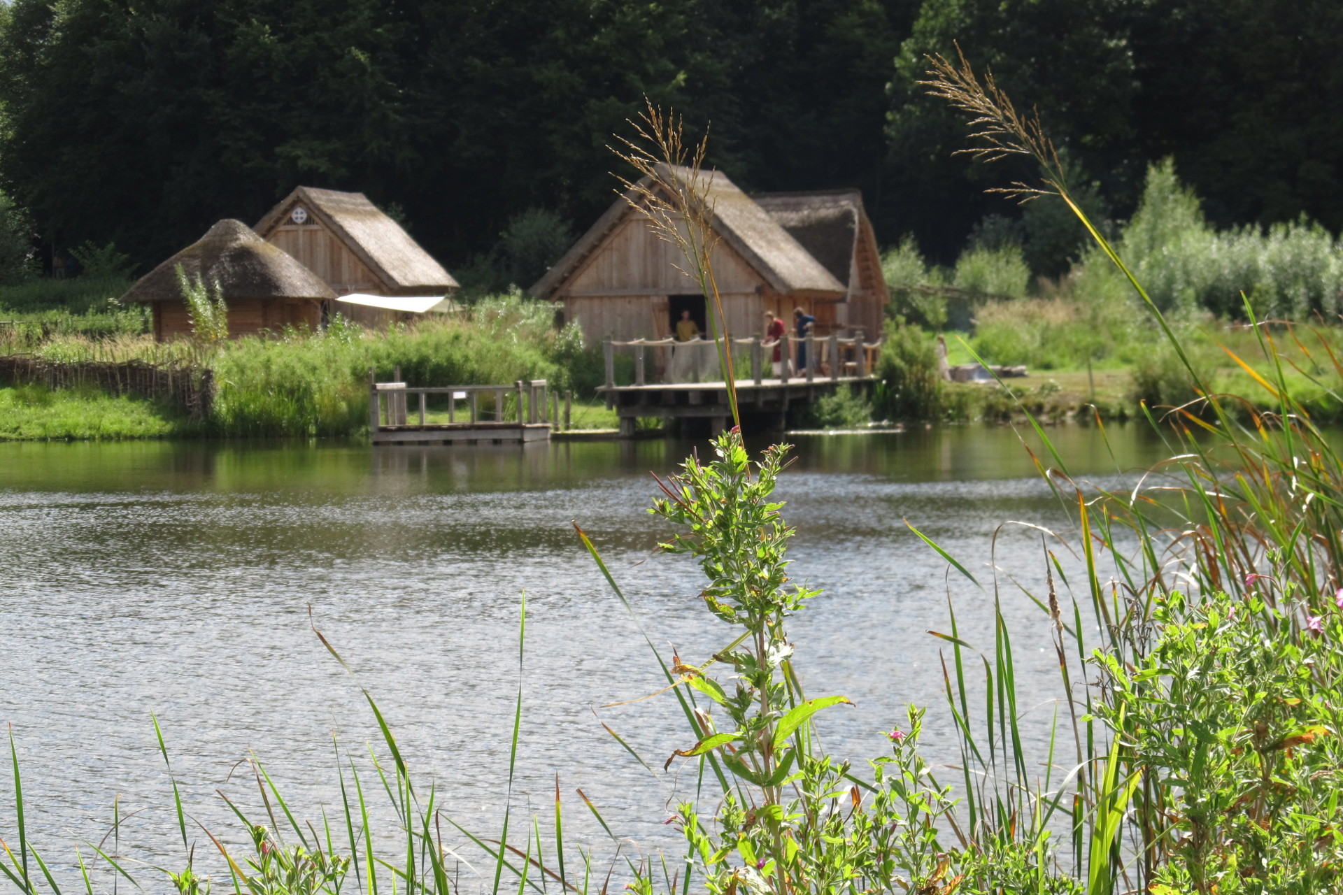 Blick über den Wallsee auf den Bootssteg und temporär bewohnte Handwerkerhäuser.